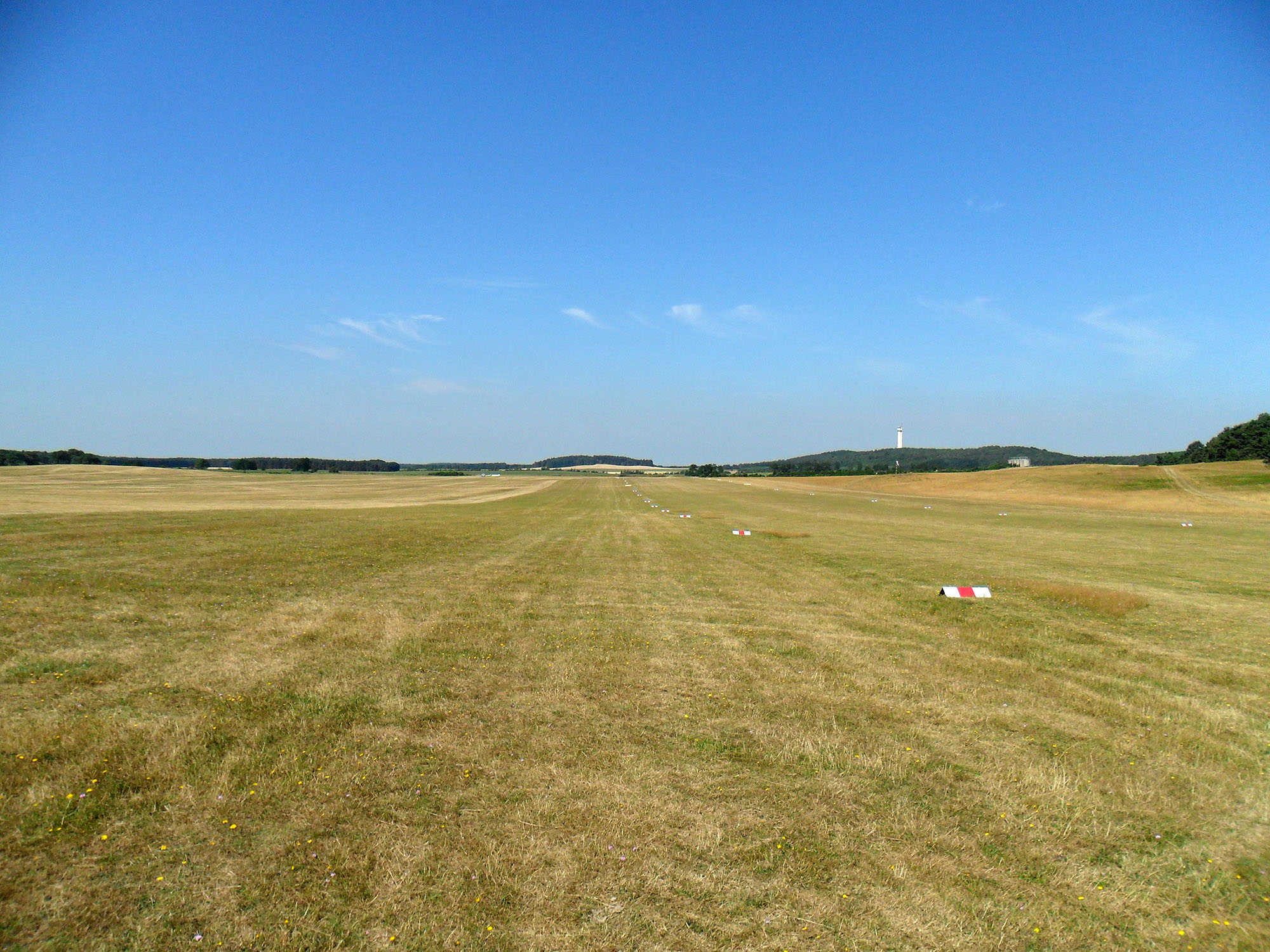 Flugplatz Stöllen/Rhinow 2010